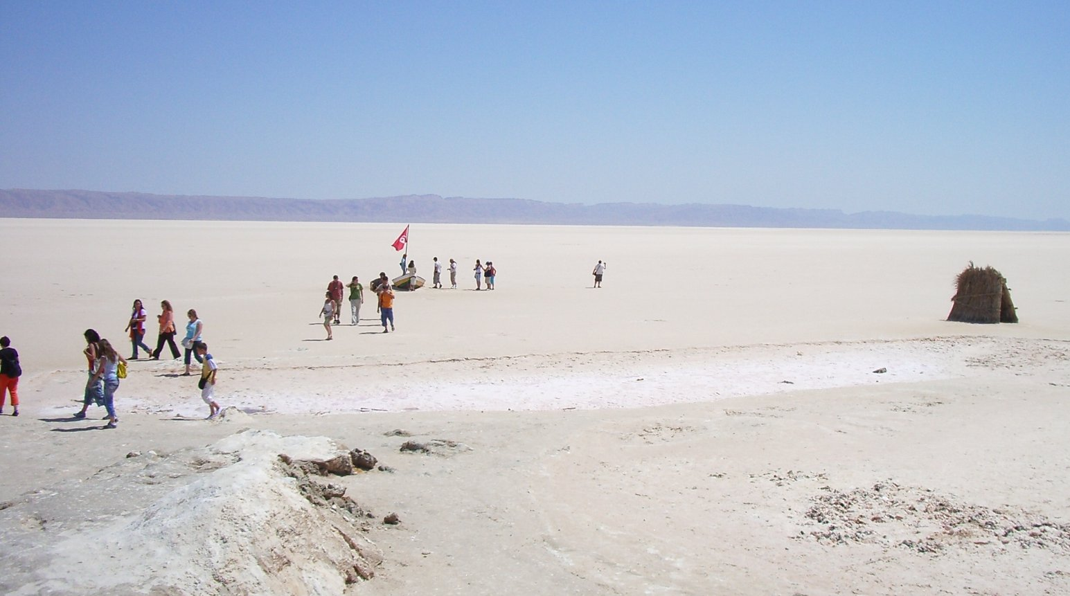 Chott el Djerid